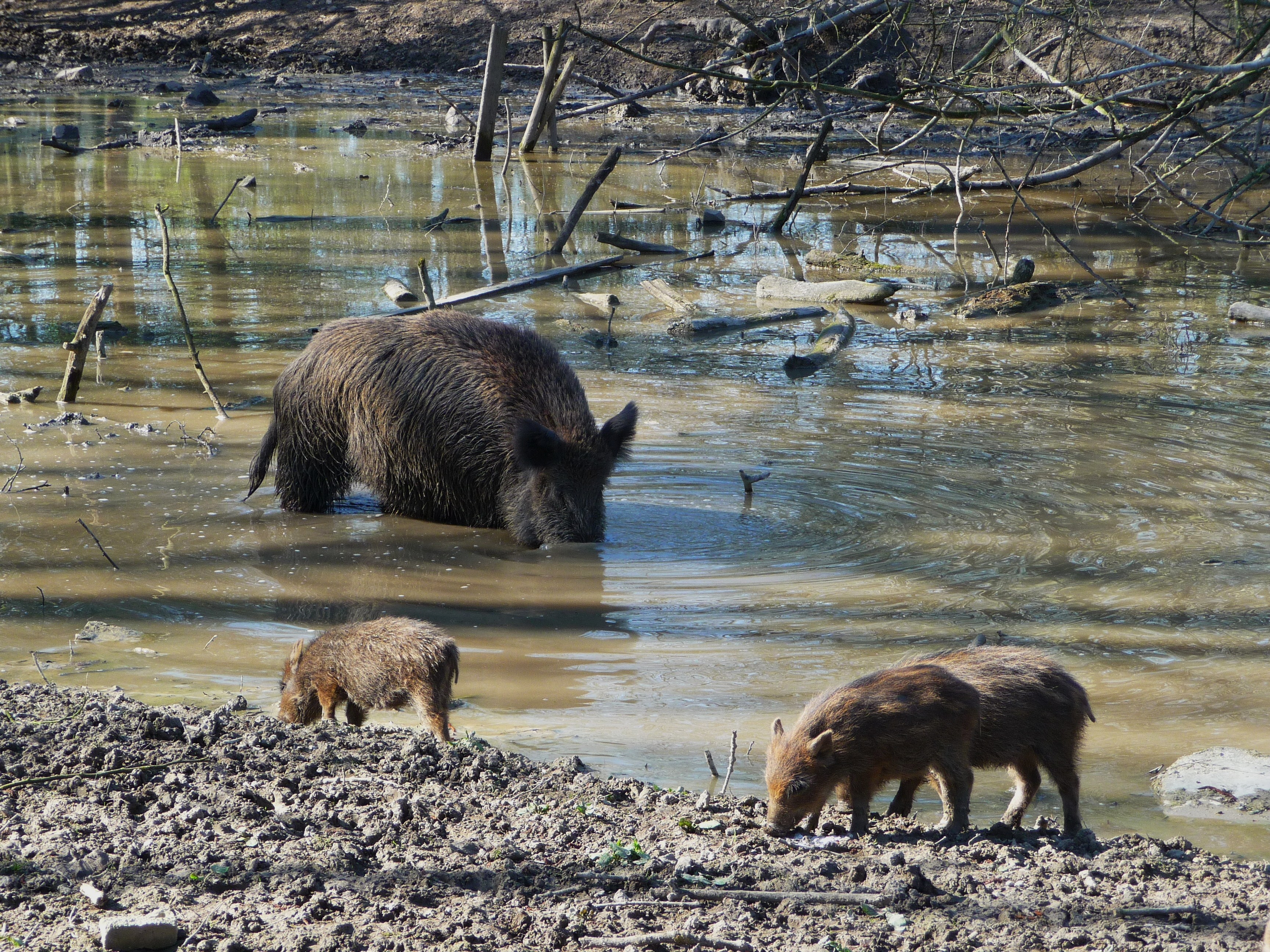 Wildschweinbache (Sus scrofa) mit Frischlingen, fotografiert im Wildpark Ludwigshafen-Rheingönnheim (Rheinland-Pfalz, Deutschland)